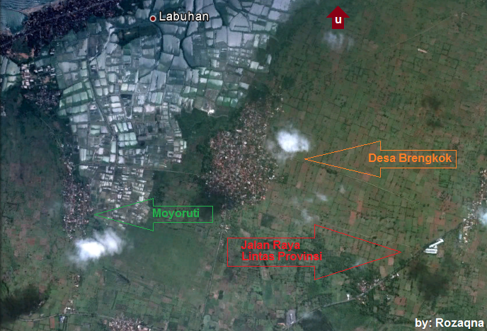 map of Brengkok village